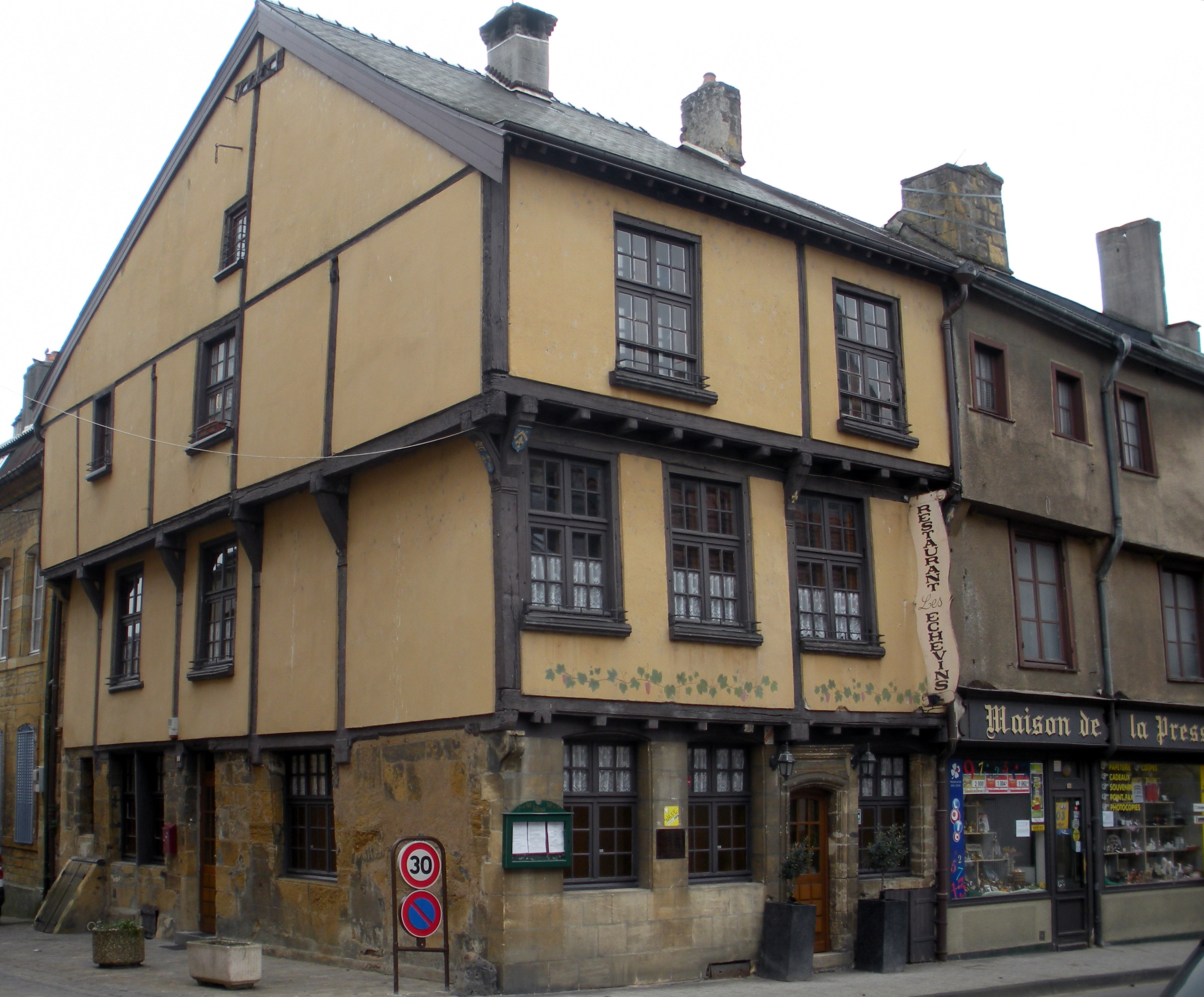 Maisons espagnoles, Grande-Rue 61, Mouzon ;(Inscrit, 1942) .